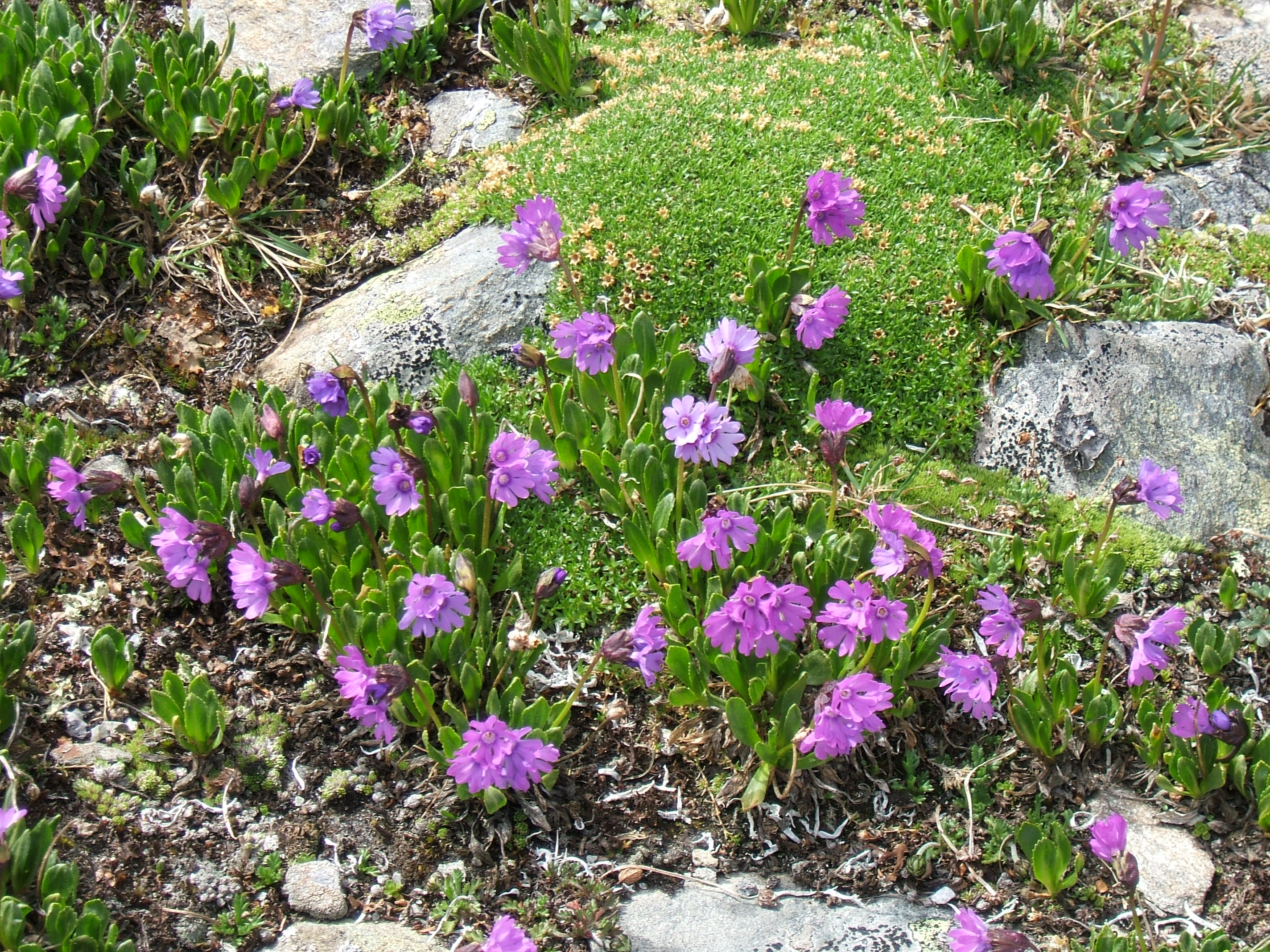 Klebrige Primel nahe der Kaunergrathütte auf ca. 3000m